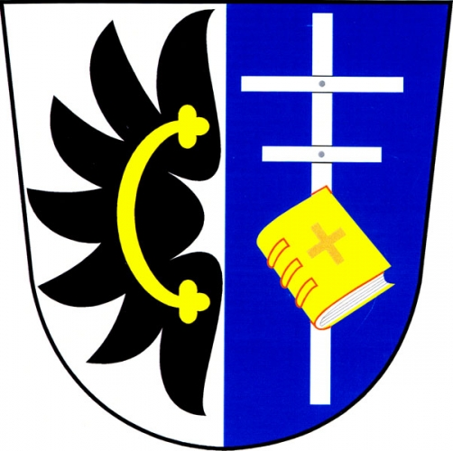 znak, Pavlov, okres Žďár nad Sázavou